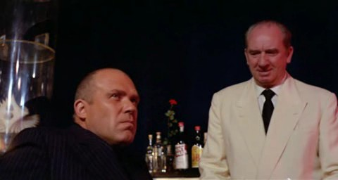 Screenshot dal film Milano Calibro 9